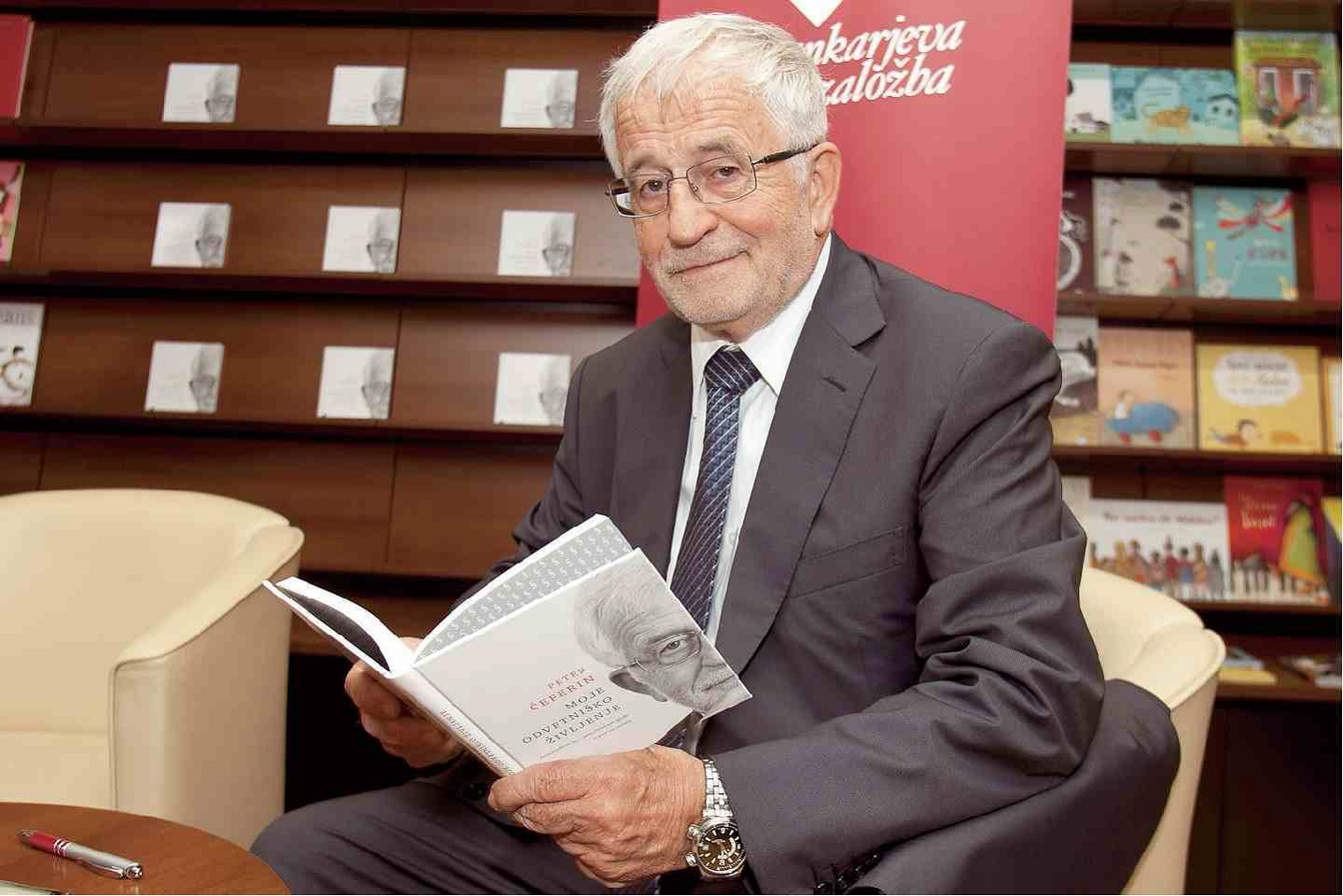 Na predstavitvi knjige: Moje odvetniško življenje